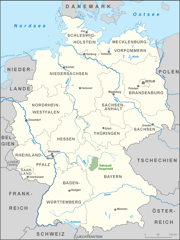 Karte des Naturparks Steigerwald in Deutschland (auf Deutsch beschriftet)